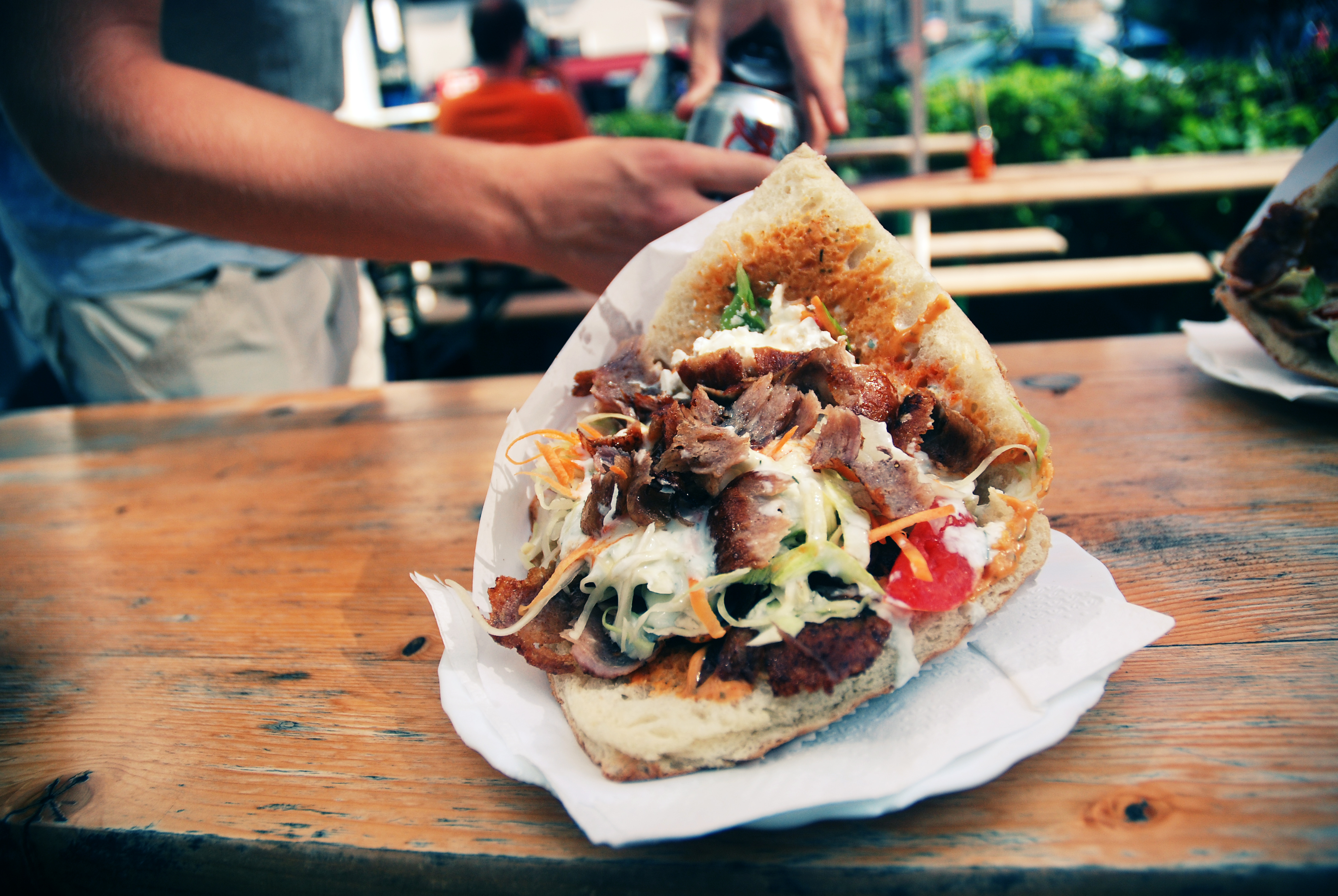 Döner in Cologne, Germany. Döner kebab